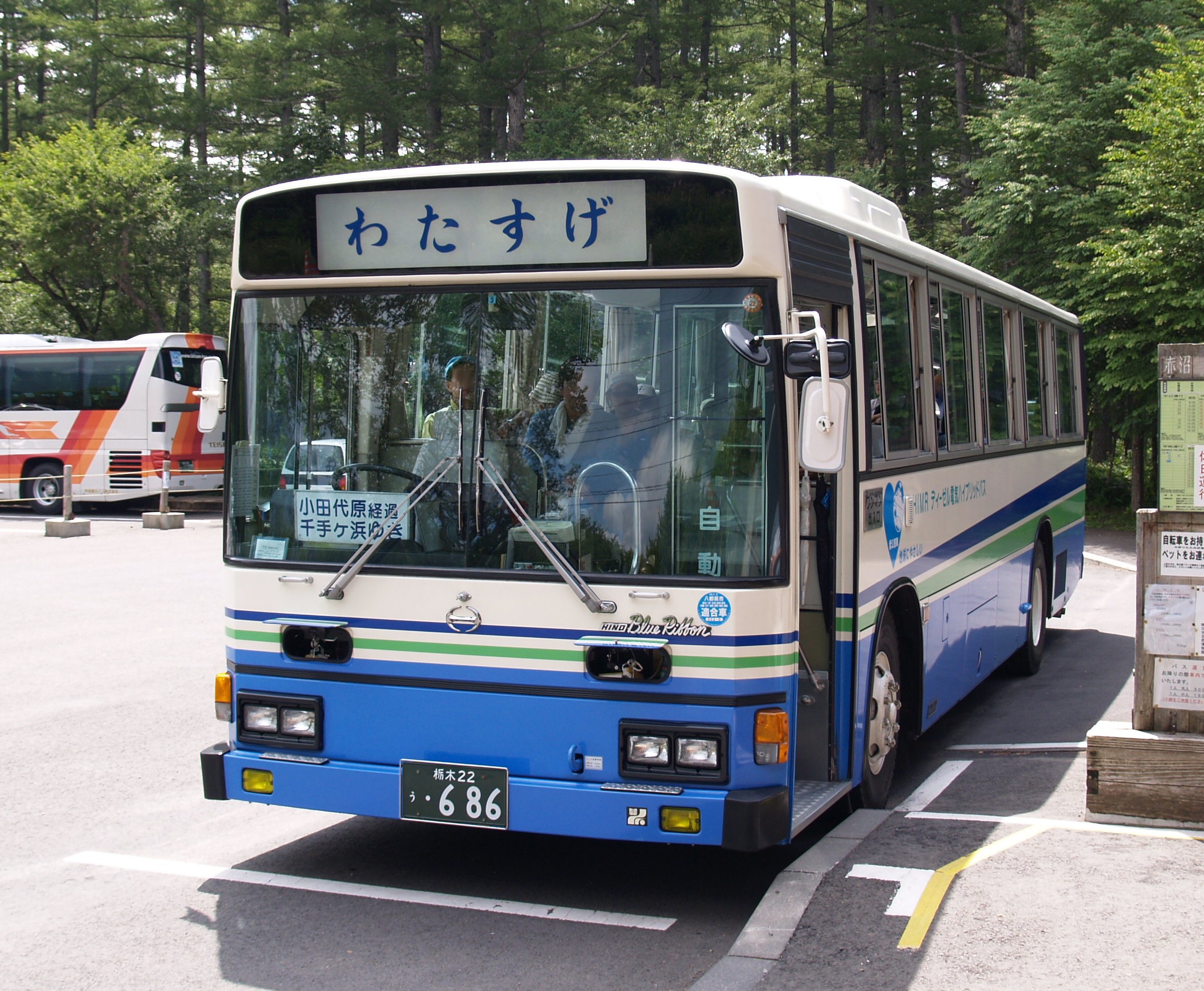 日光交通が運行する低公害バス「わたすげ号」